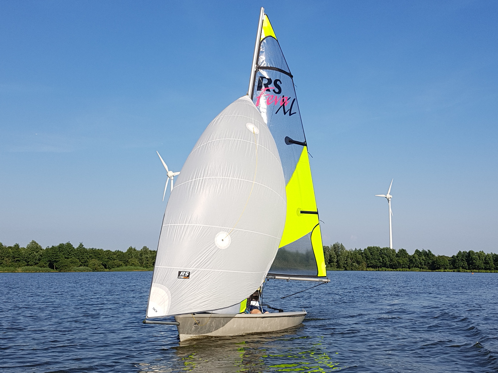 Eine Jolle des Typs "RS Feva" mit Gennaker bei mäßigem Wind in Hamburg. Das Boot fährt hier auf Vormwindkurs.